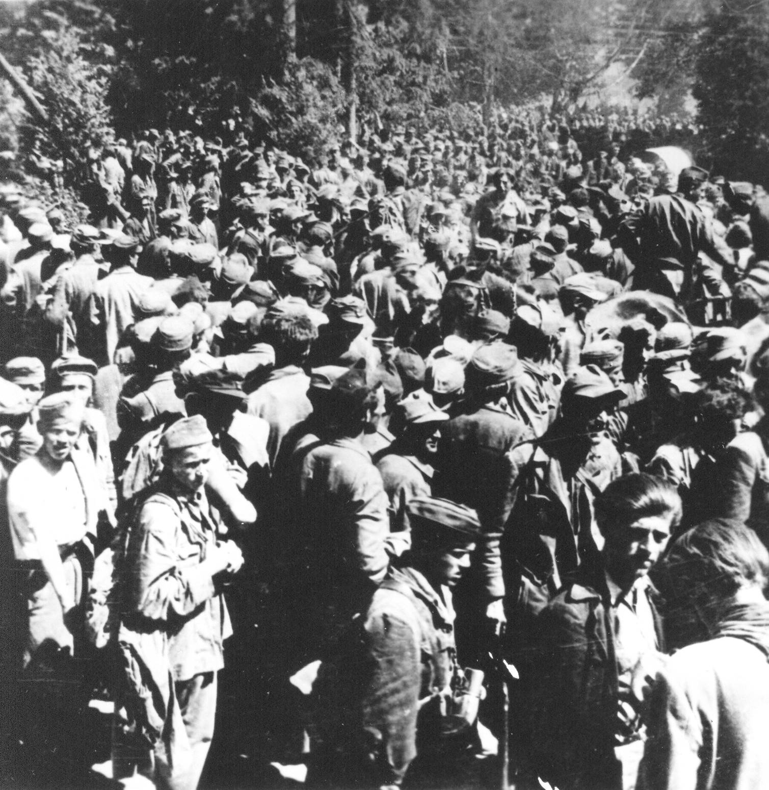 Zarobljene ustaše kod Blajburga na granici Slovenije i Austrije, maj 1945.